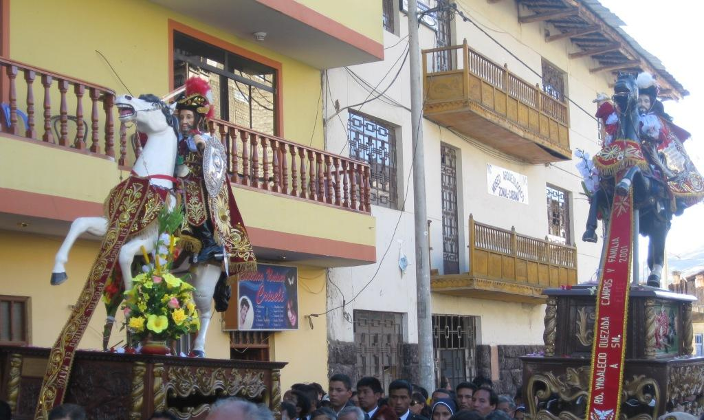 El Apóstol Santiago el Mayor, Patrono de Cabana y San Felipe